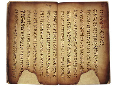 Yi manuscript